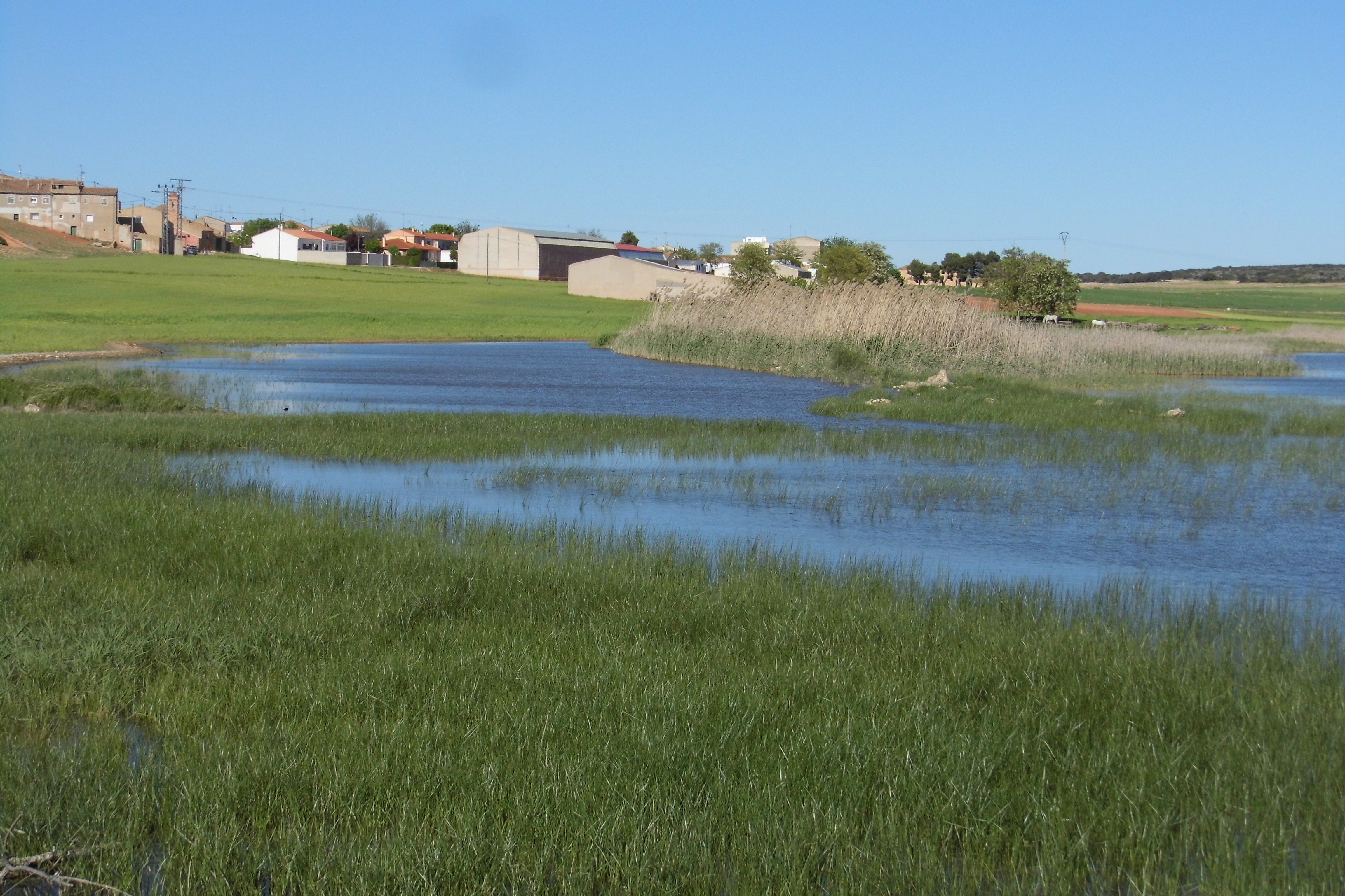 Lagunas saladas de Pétrola y Salobrejo y complejo lagunar de Corral-Rubio This is a photography of a Site of Community Importance in Spain with the ID: ES4210004. Natura2000 entry, EEA entry